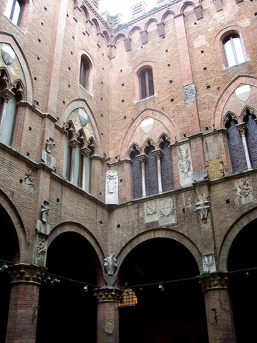 Siena - Cortile di Palazzo Pubblico